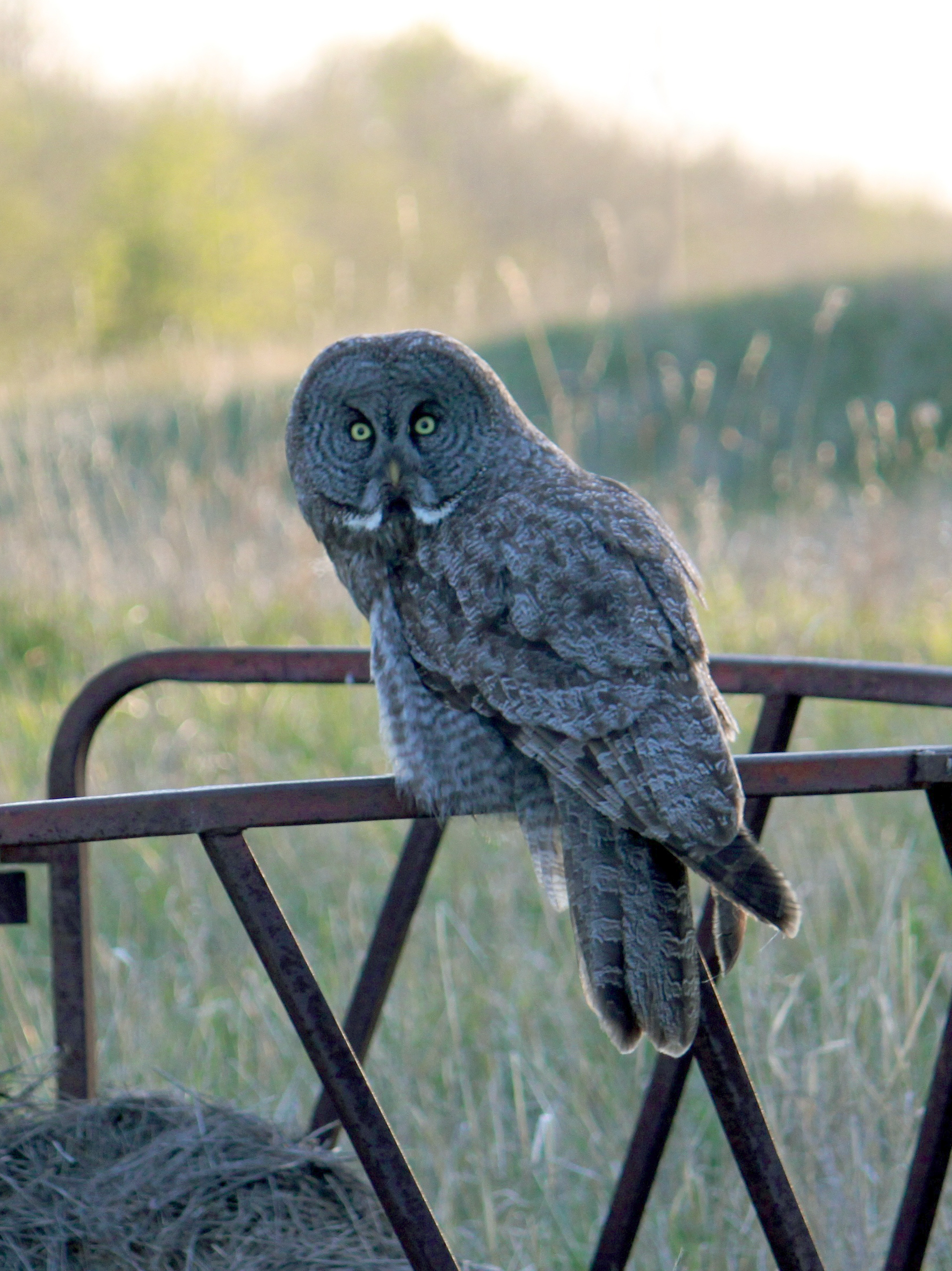 Great Grey Owl Strix nebulosa, Baldonnel, BC, Canada.